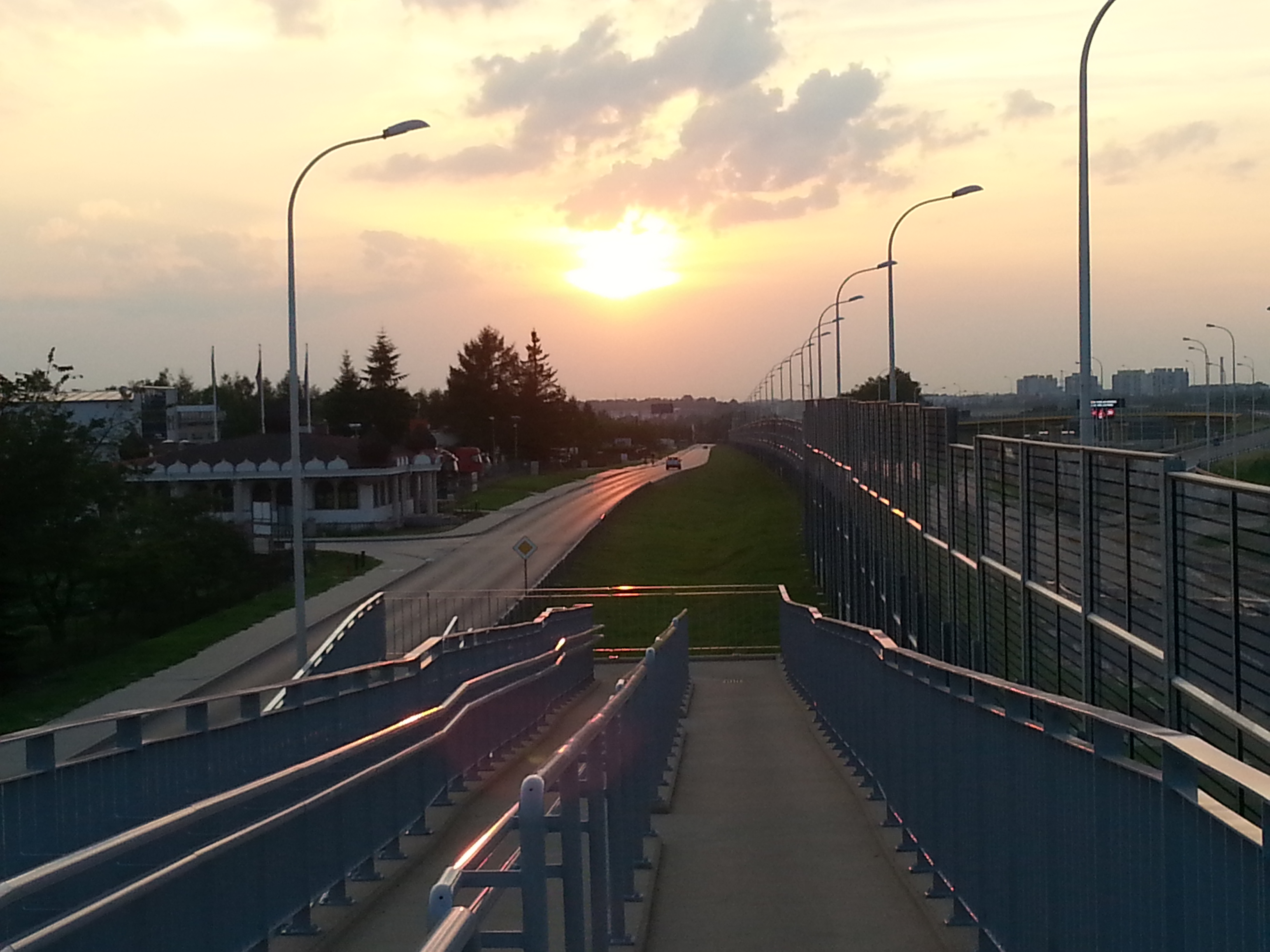 Widok z kładki dla pieszych nad drogą ekspresową S17. Po lewej stronie od drogi serwisowej znajduje się miejscowość Kalinówka, w oddali widać Lublin - osiedle Jagiellońskie (Felin).